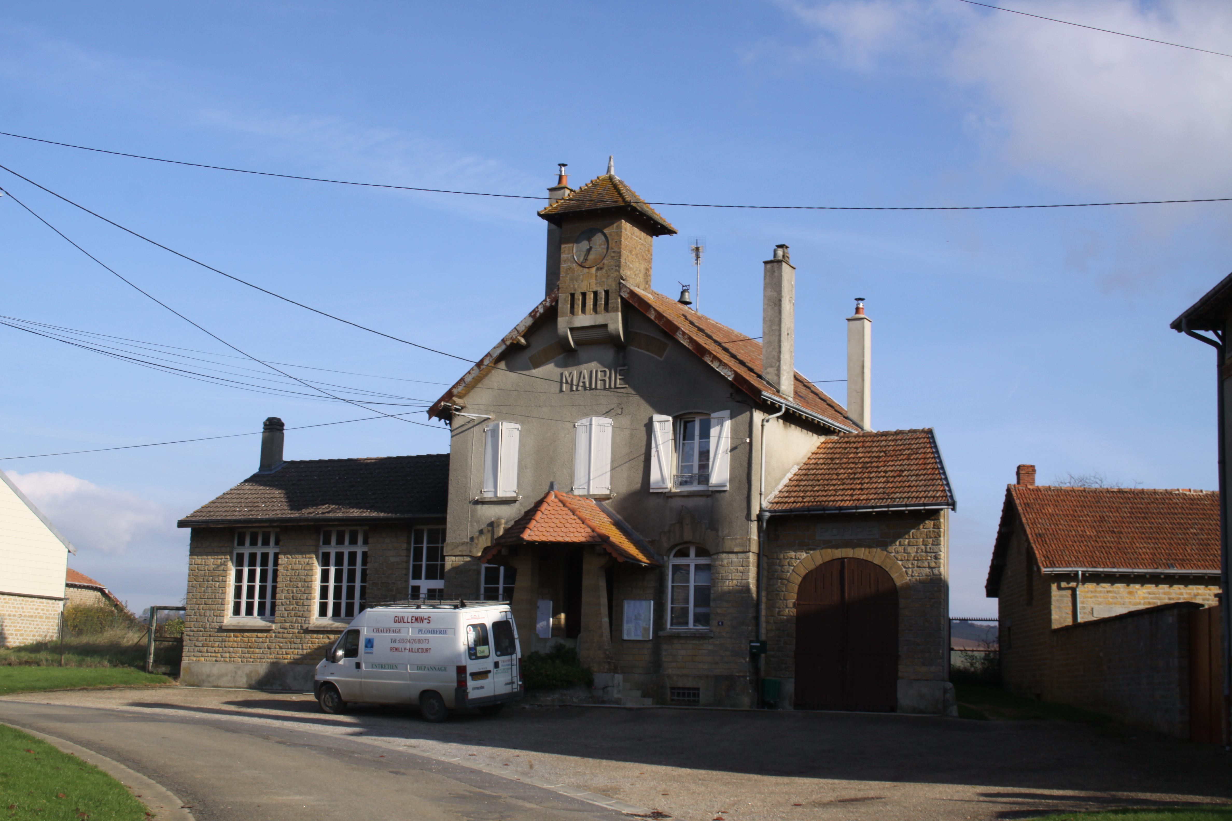 Village Ardennais